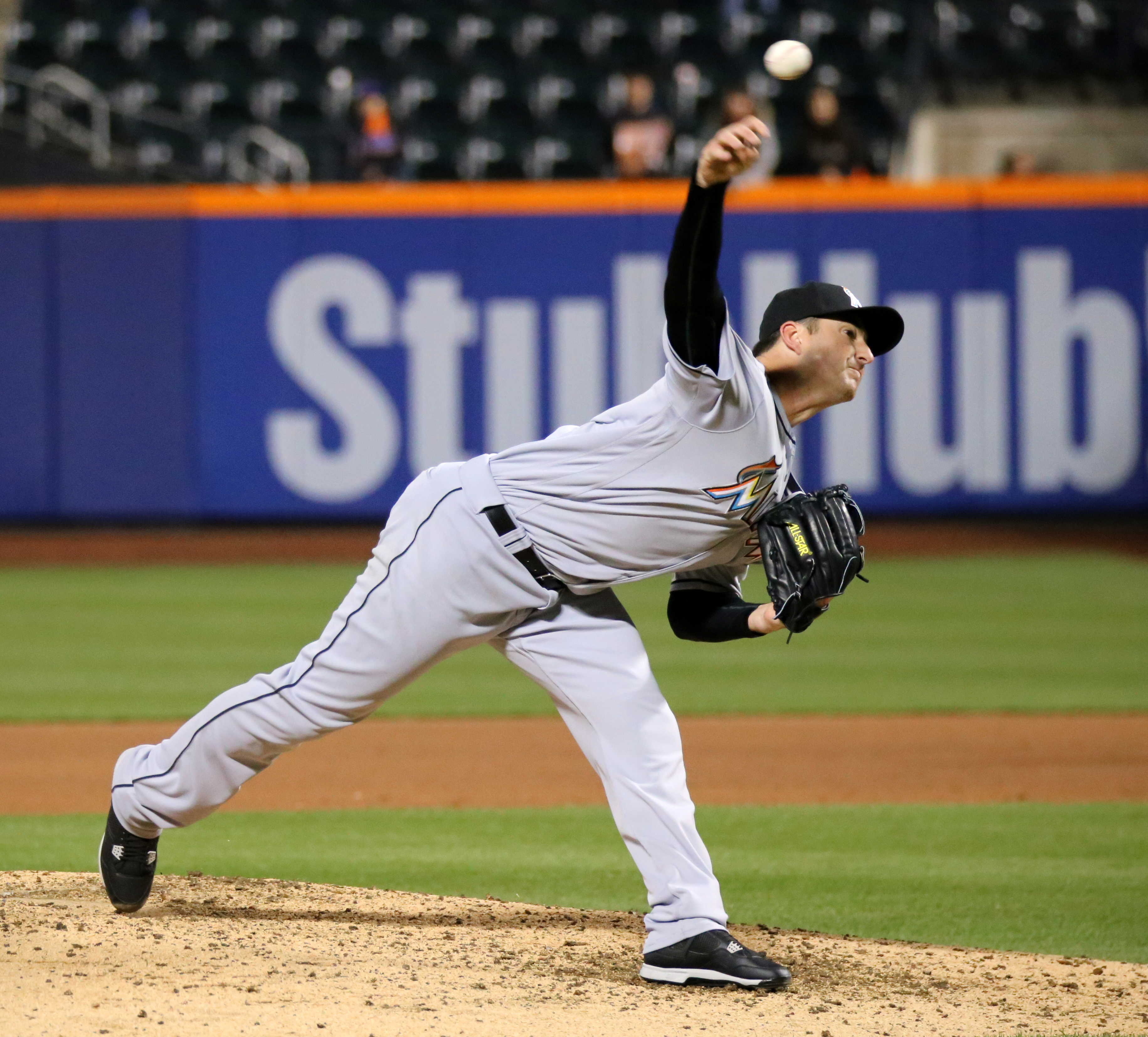 Bryan Morris